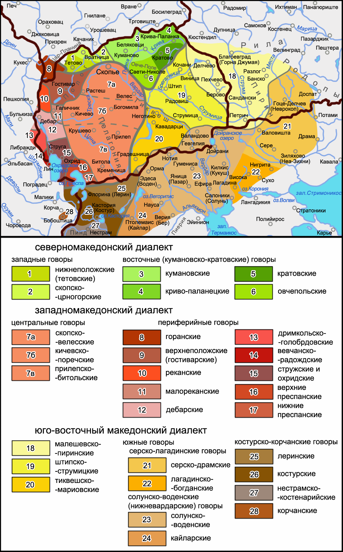 Карта диалектов македонского языка. Источники: Преглед на македонски дијалекти (со звучен запис на дијалектните текстови). Врз основа на трудовите на академик Божидар Видоески (pdf, mp3) / подготвил М. Марковиќ. — Скопје: МАНУ. Центар за ареална линвистика. — С. 33 (Дијалектите на македонскиот јазик). Friedman V. A. Macedonian // The Slavonic Languages / Edited by Comrie B., Corbett G. — London, New York: Routledge, 1993. — 249—305 p. — ISBN 0-415-04755-2. Коряков Ю. Б. Приложение. Карты славянских языков. 3. Балкано-славянские языки // Языки мира. Славянские языки. — М.: Academia, 2005. — ISBN 5-87444-216-2.